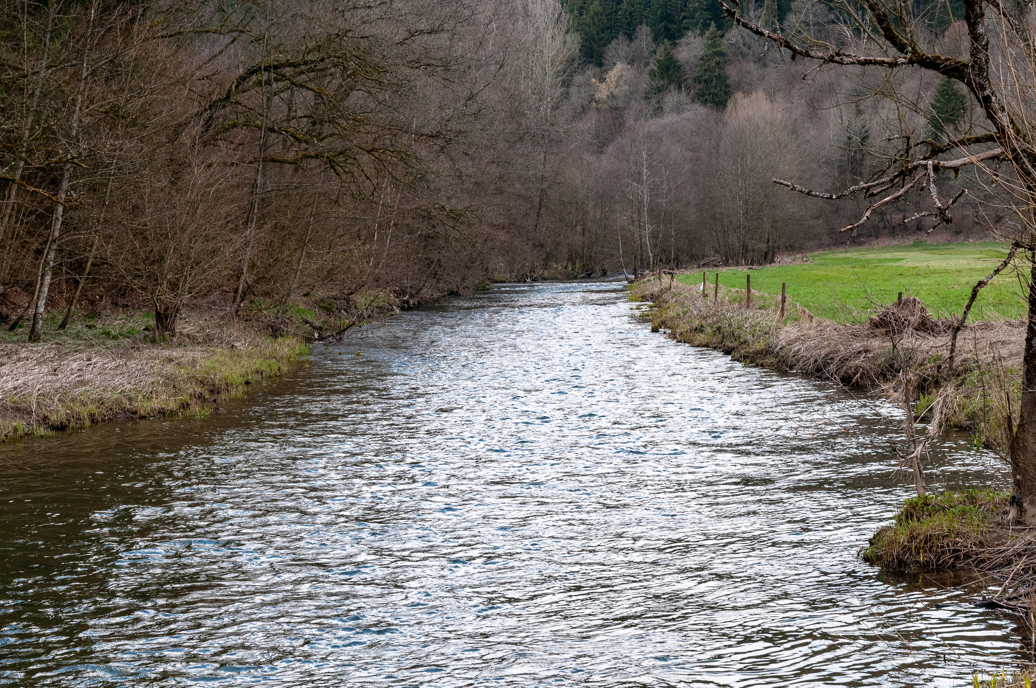 En Amont vun der Gossemaark LB176 mécht d'Sauer d'Grenz mat der Belsch (riets op der Foto).